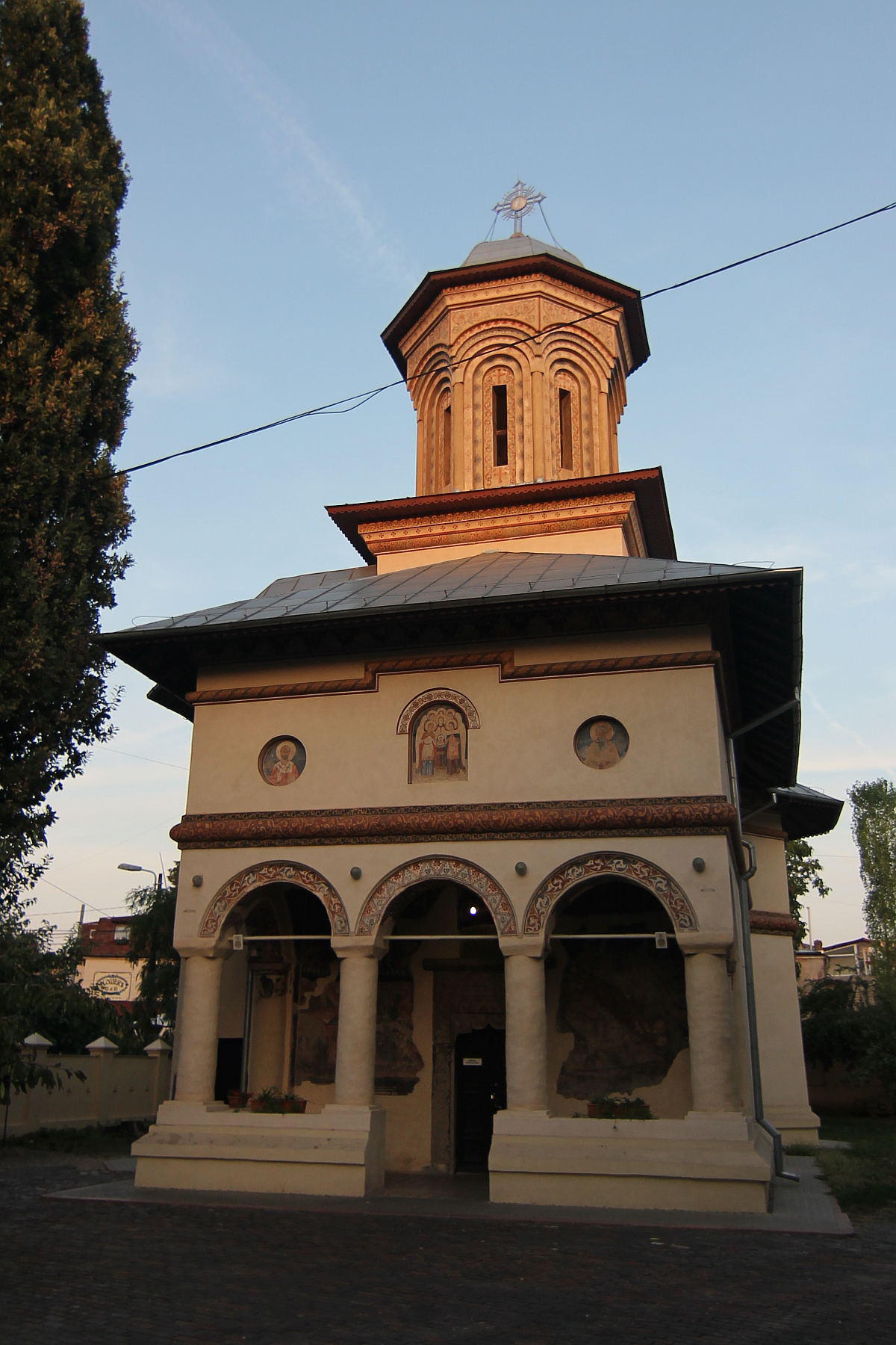 Ansamblul Bisericii Mântuleasa